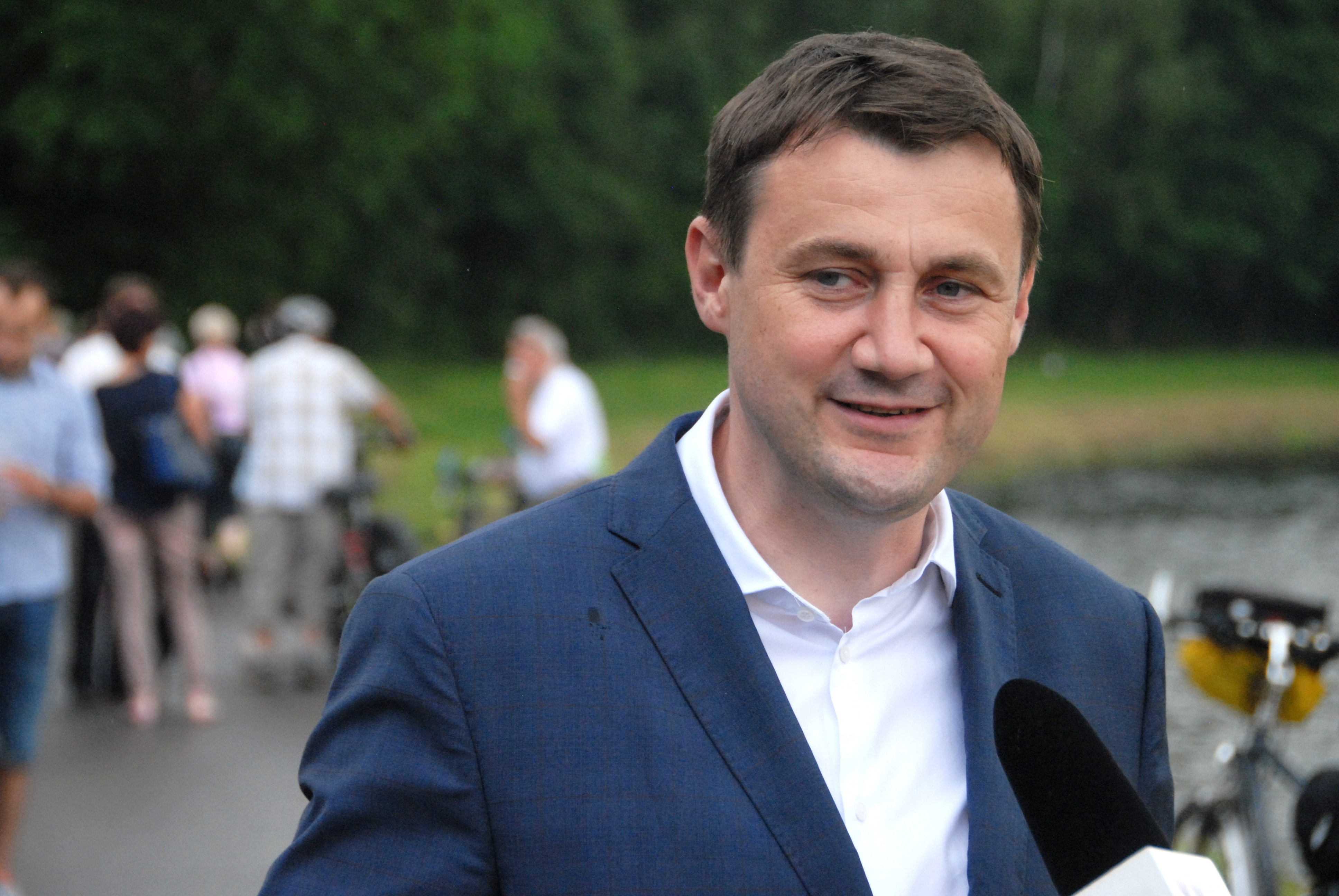 Martin Půta bei einem Interview zum Fest am Dreiländereck 2016